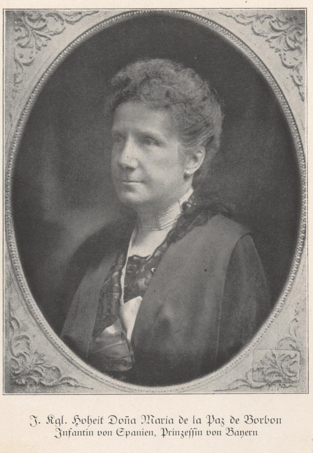 Prinzessin Maria de la Paz von Bayern (1862-1946)